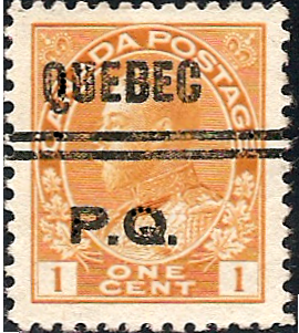 Timbre Canada préoblitéré Québec 1911 (3-105)